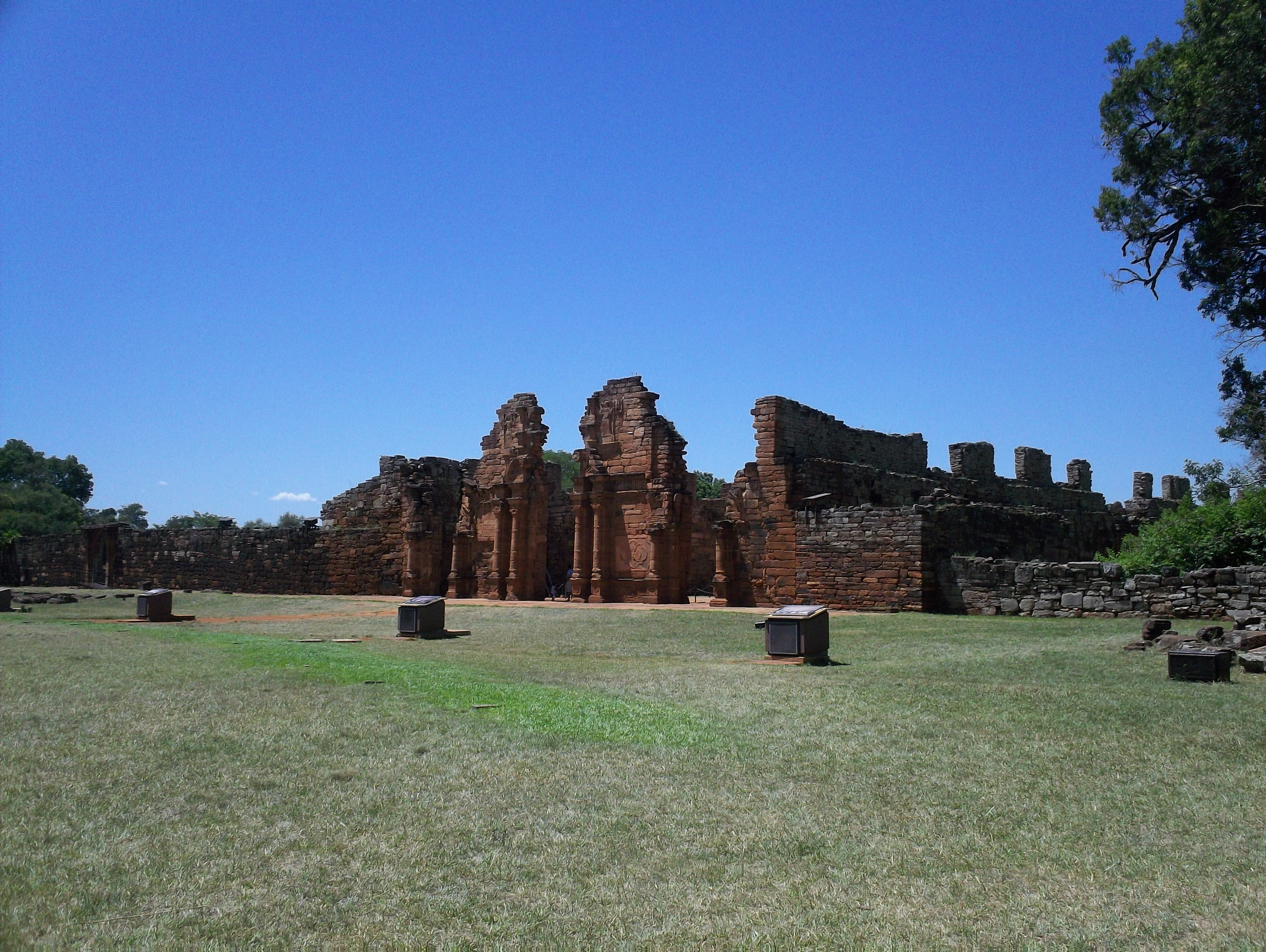 Fotografia tomada en vacaciones en Enero 2012